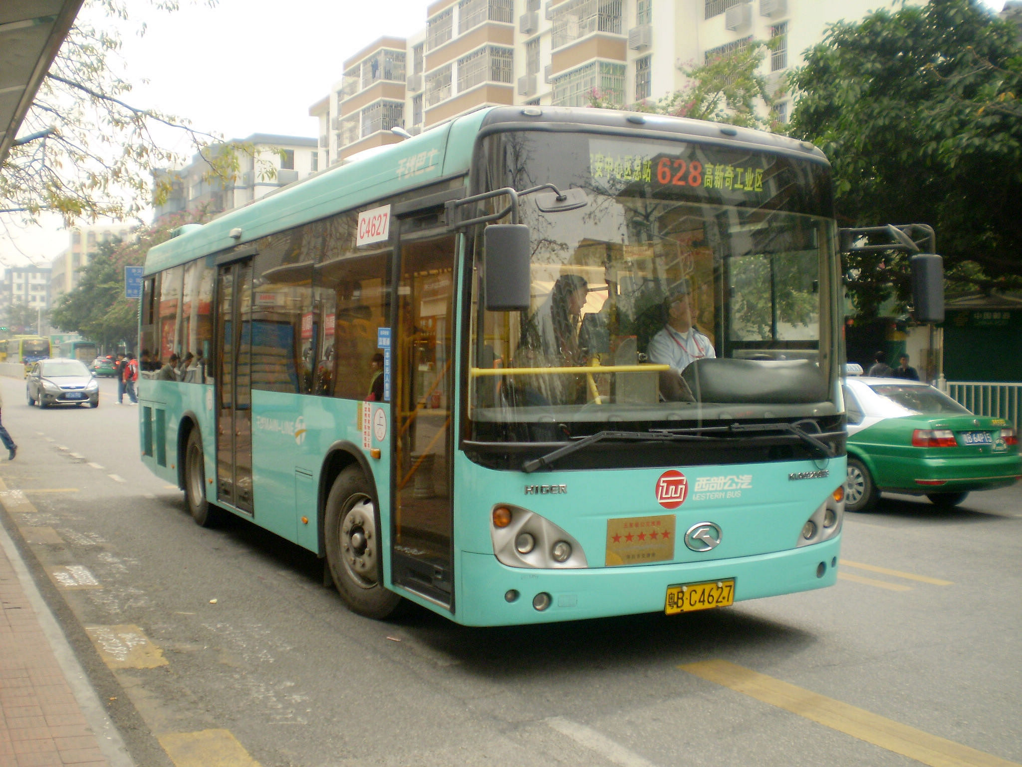 深圳公交628路KLQ6920GE3